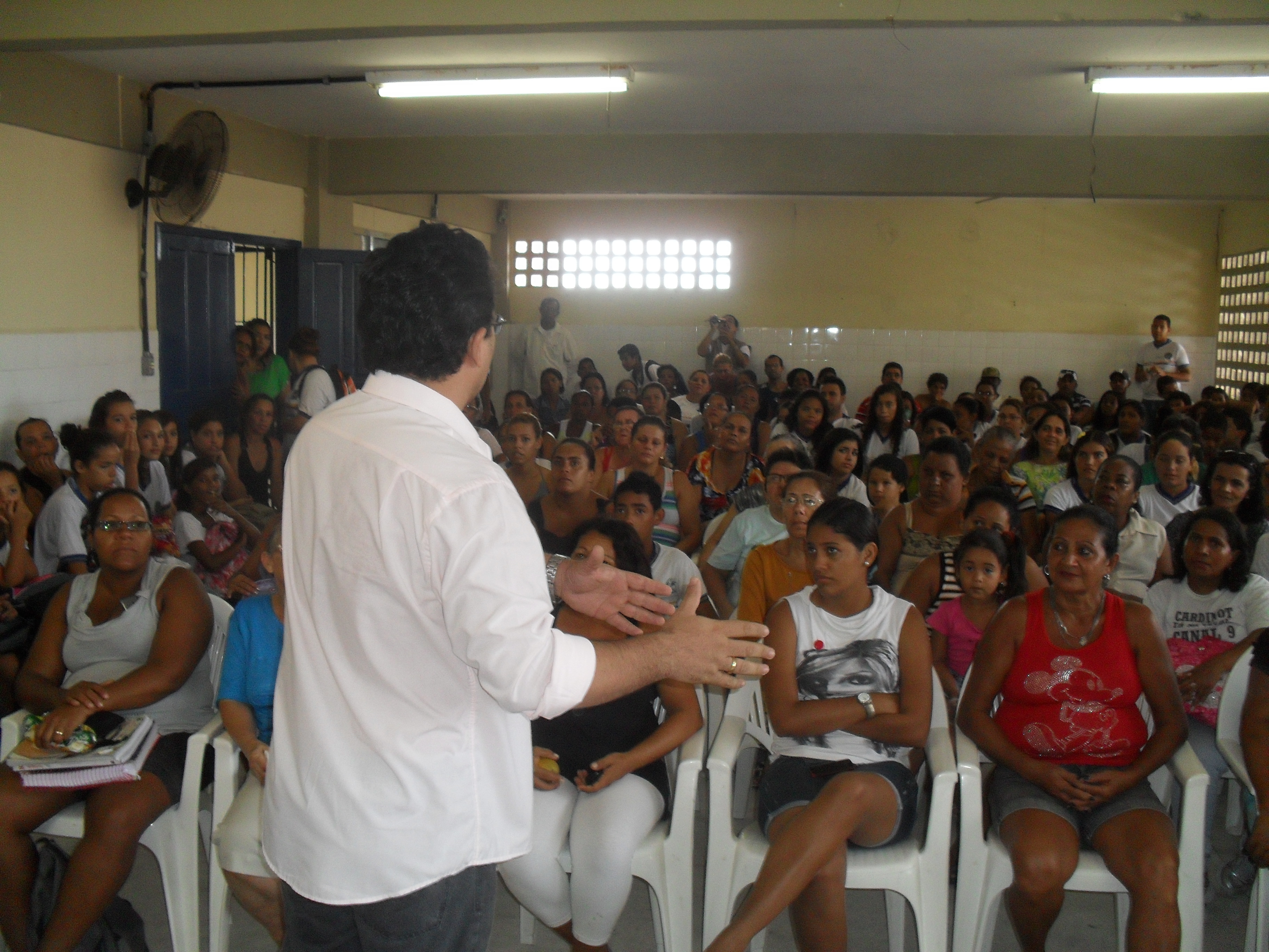 A participação da Família tem sido um marco fundamental para a Construção de uma Gestão Democrática e Participativa